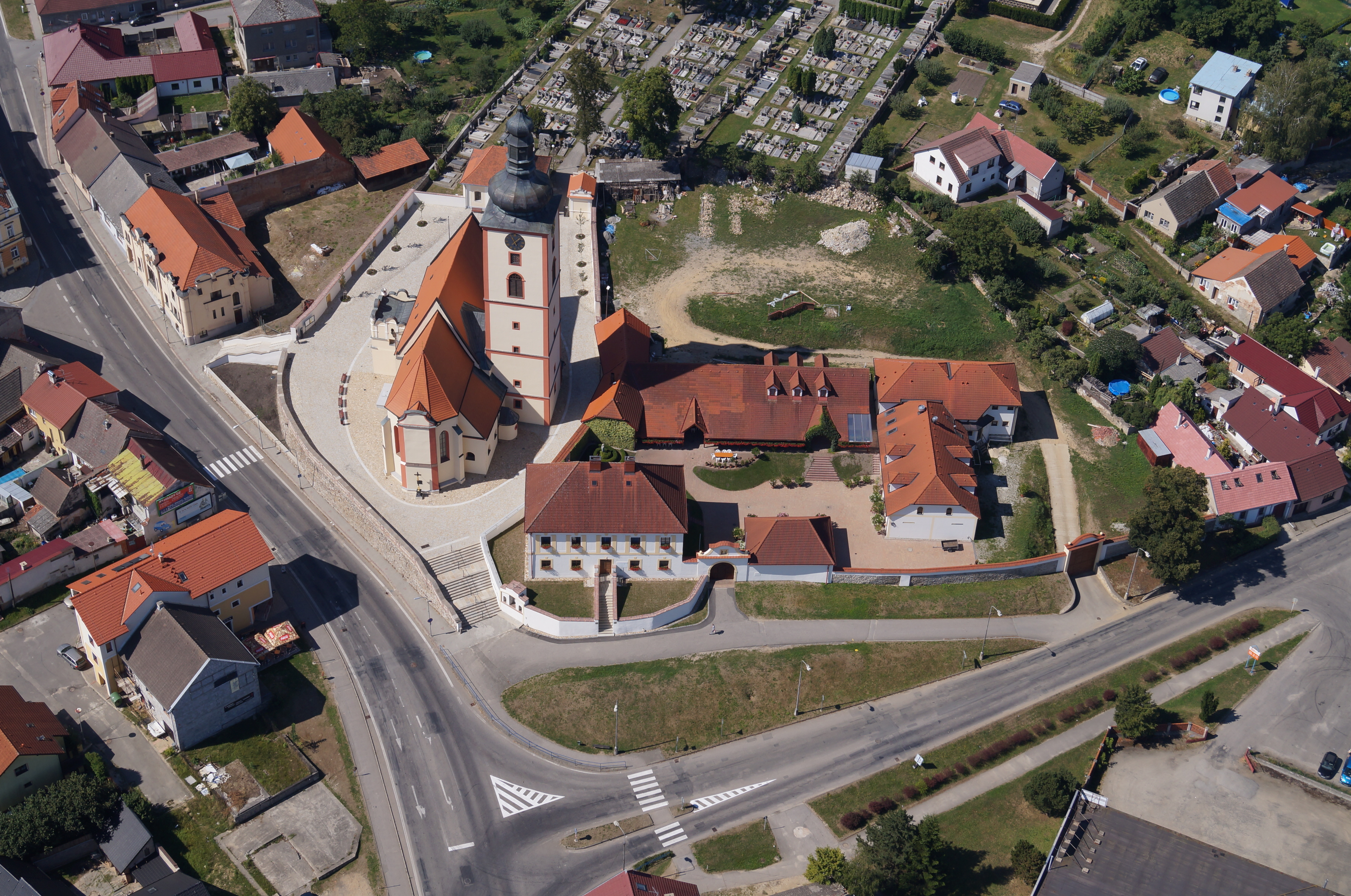 Kostel Povýšení sv. Kříže (Veselí nad Lužnicí), Veselí nad Lužnicí